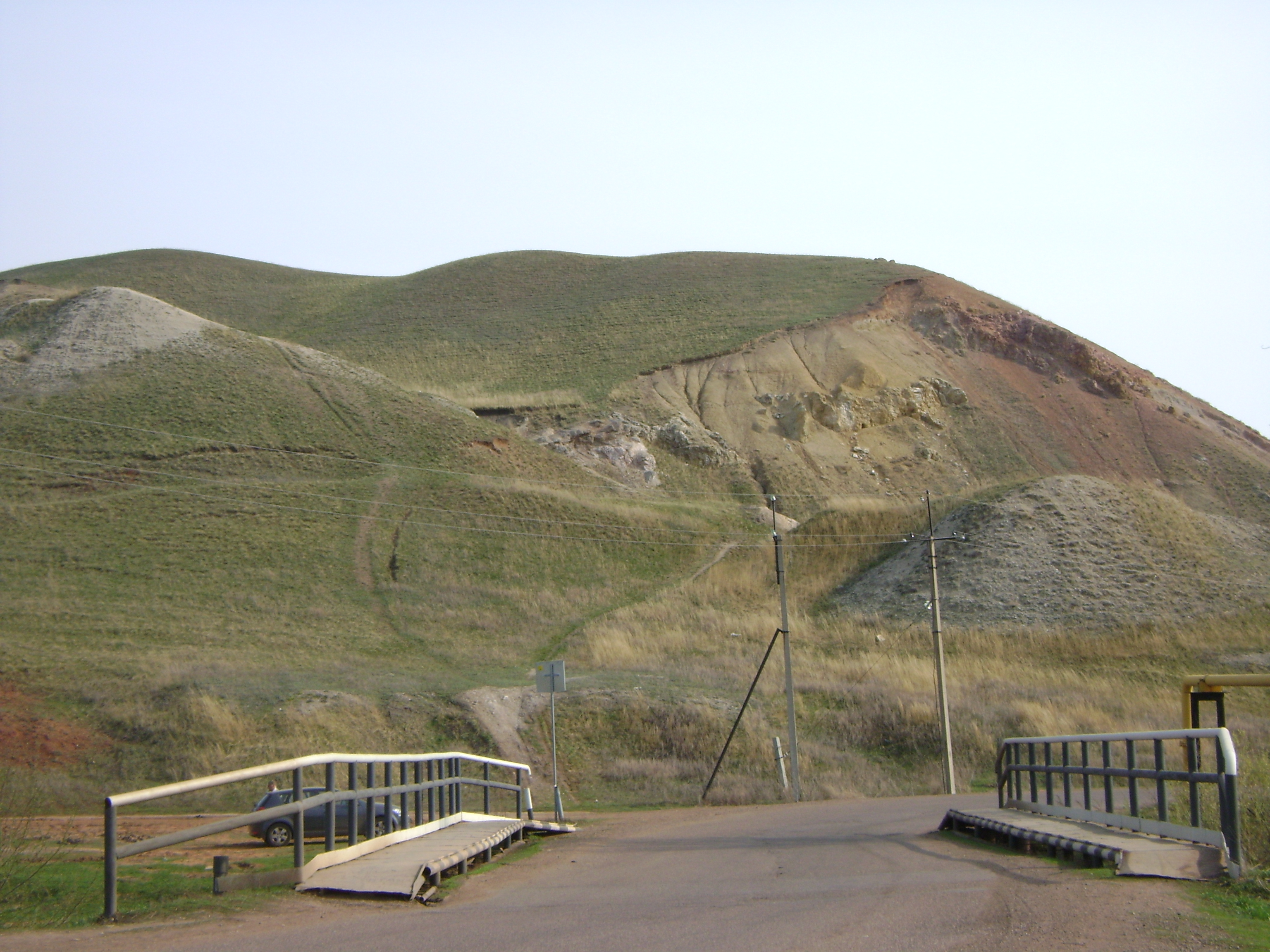 Мост через реку Тайрук и гора Алебастровая (Ишимбай)